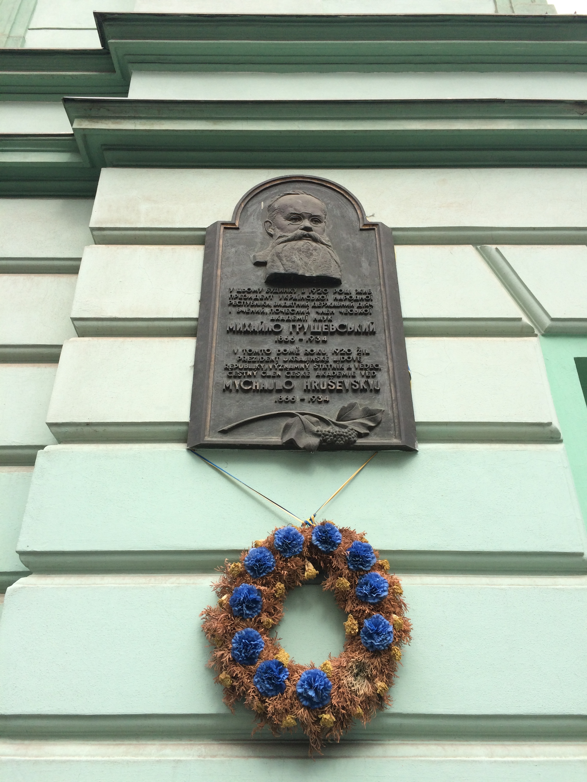 Pamětní deska na domě kde v roce 1920 žil ukrajinský historik, publicista, politik a první prezident Ukrajinské národní republiky, Mychajlo Hruševskyj. Pamětní deska se nachází na domě číslo 872/28 v Praze v Dobrovského ulici.